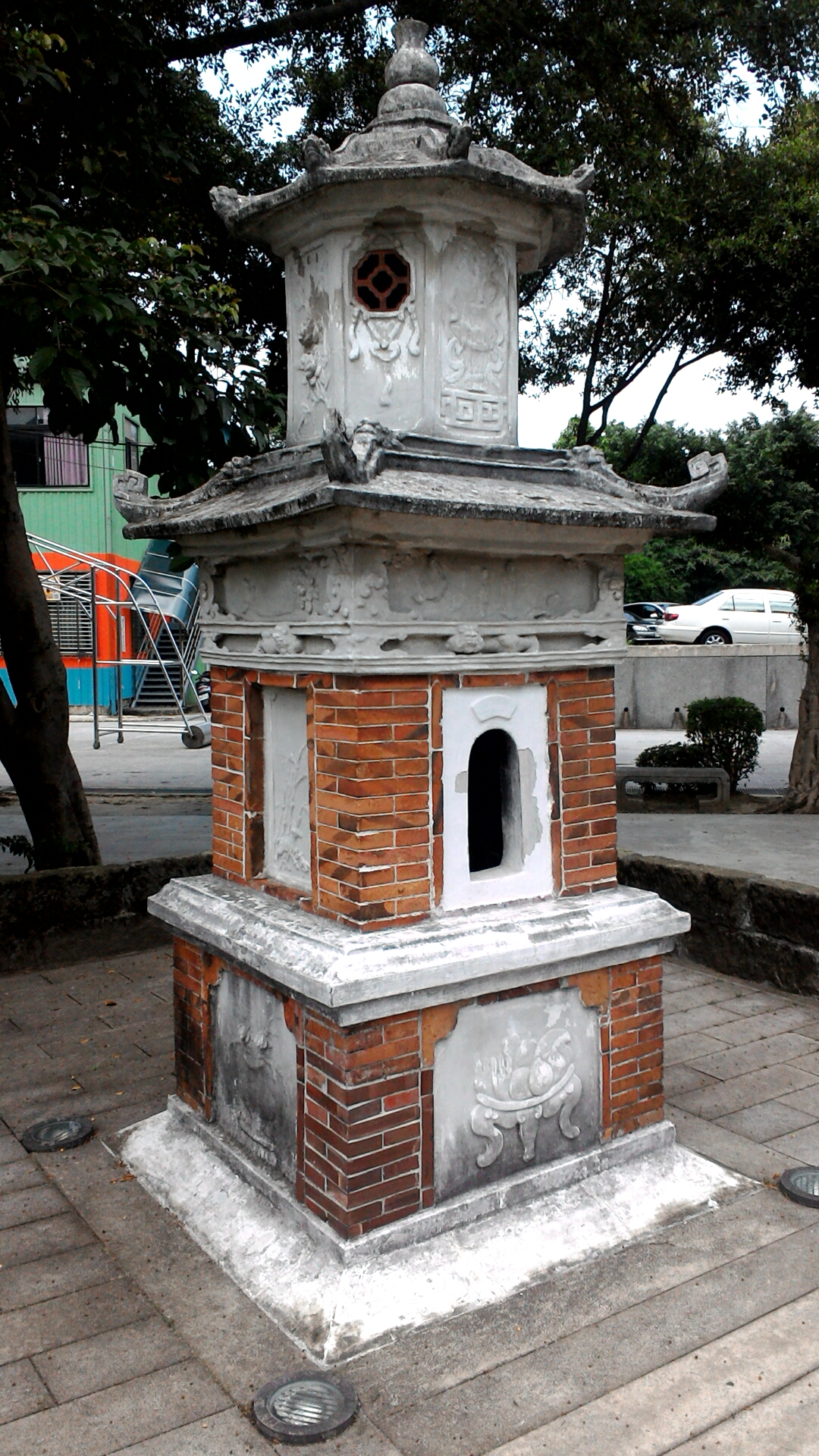 樹林聖蹟亭(2),新北市樹林區潭底里